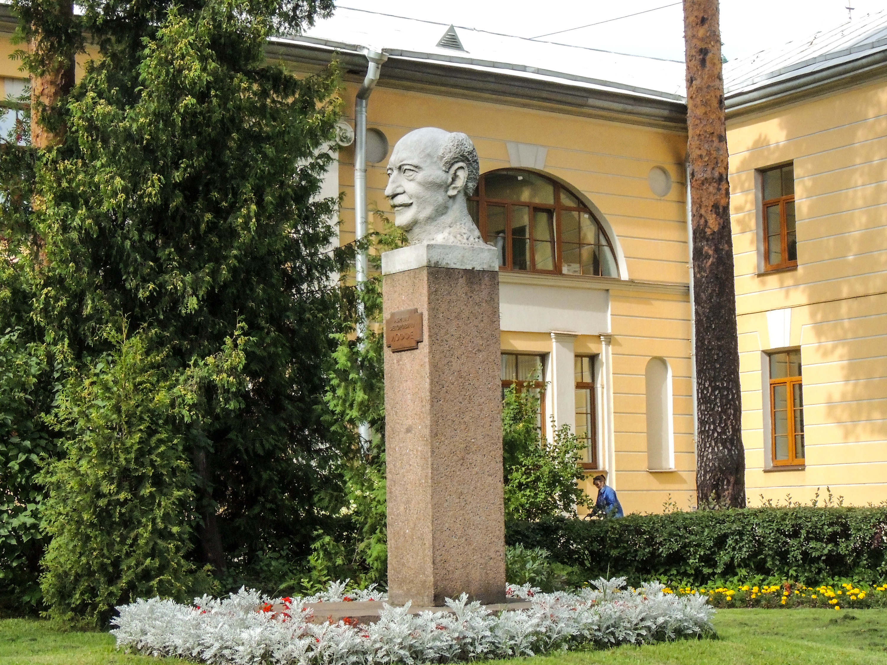 Курдонёр: Политехническая улица, 26, Выборгский район, Санкт-Петербург